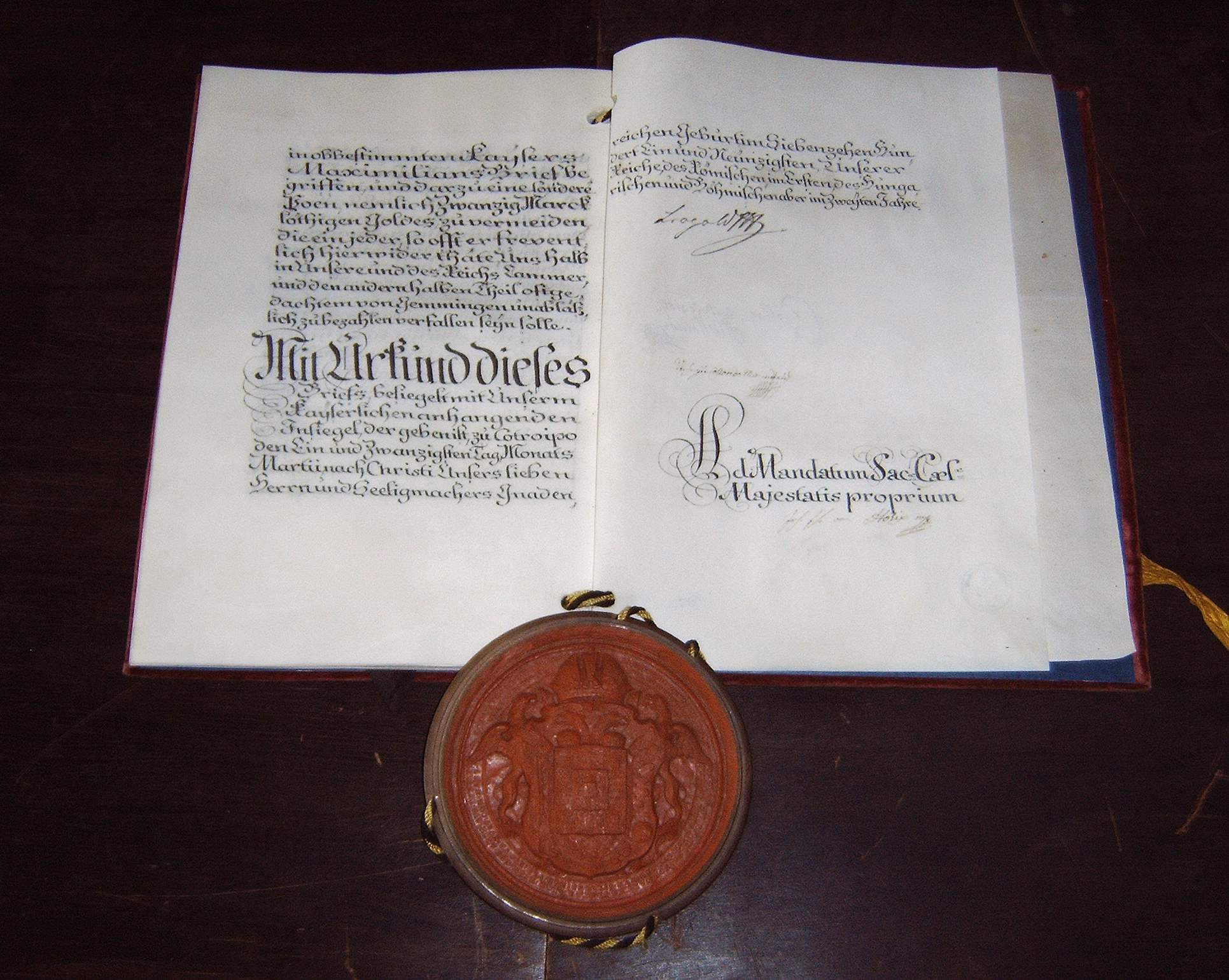 Urkunde von Kaiser Leopold II., welche 1791 die Blutsgerichts-Gerechtigkeit der Herren von Gemmingen erneuert. Archiv Burg Hornberg.